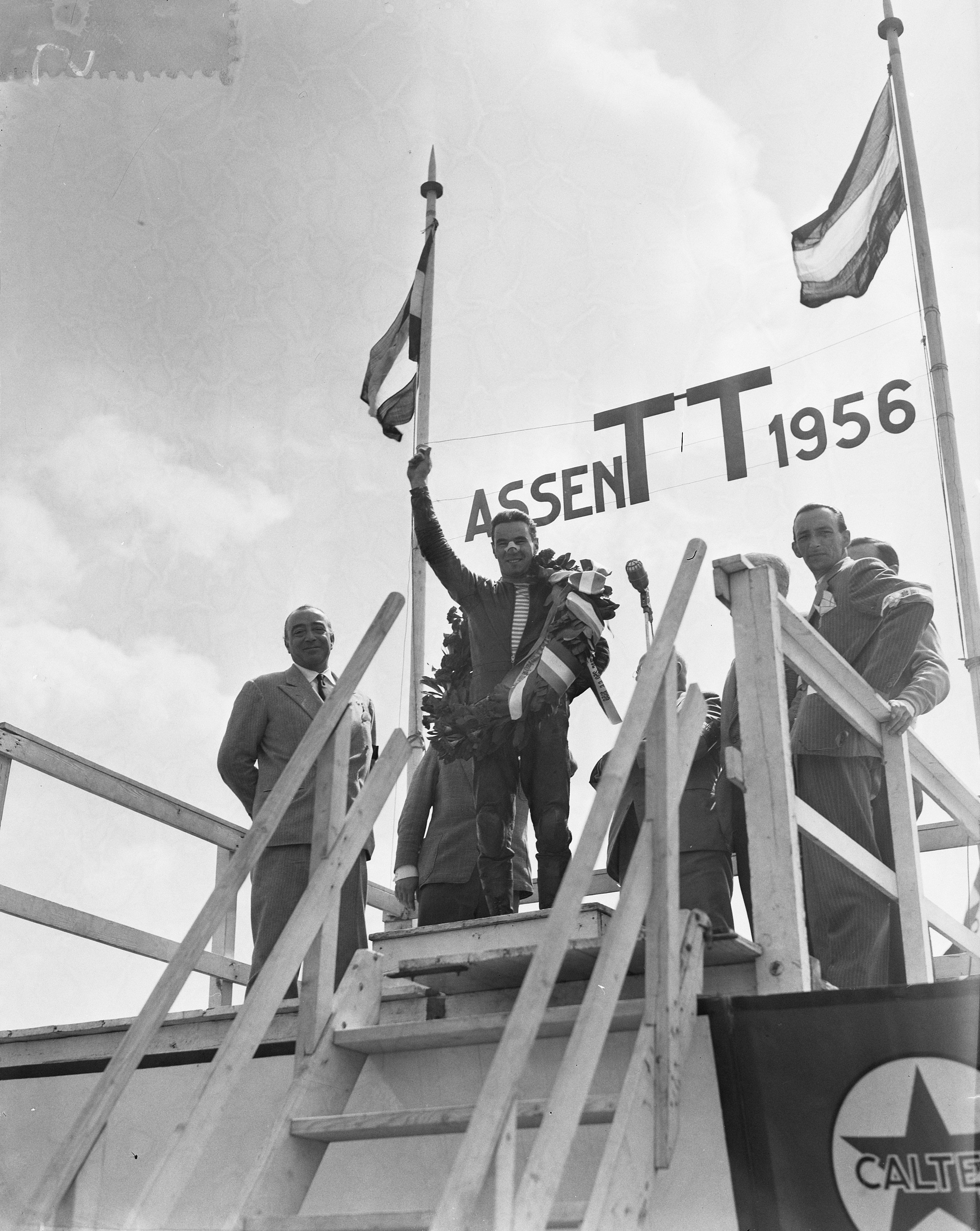 Collectie / Archief : Fotocollectie Anefo Reportage / Serie : TT Assen 1956 Beschrijving : Carlo Ubbiali (Italië) winnaar 125cc en 250cc Datum : 30 juni 1956 Locatie : Assen Trefwoorden : motorsport Persoonsnaam : Ubbiali, Carlo Instellingsnaam : TT Fotograaf : Bilsen, Joop van / Anefo Auteursrechthebbende : Nationaal Archief Materiaalsoort : Negatief (zwart/wit) Nummer archiefinventaris : bekijk toegang 2.24.01.04 Bestanddeelnummer : 907-8581